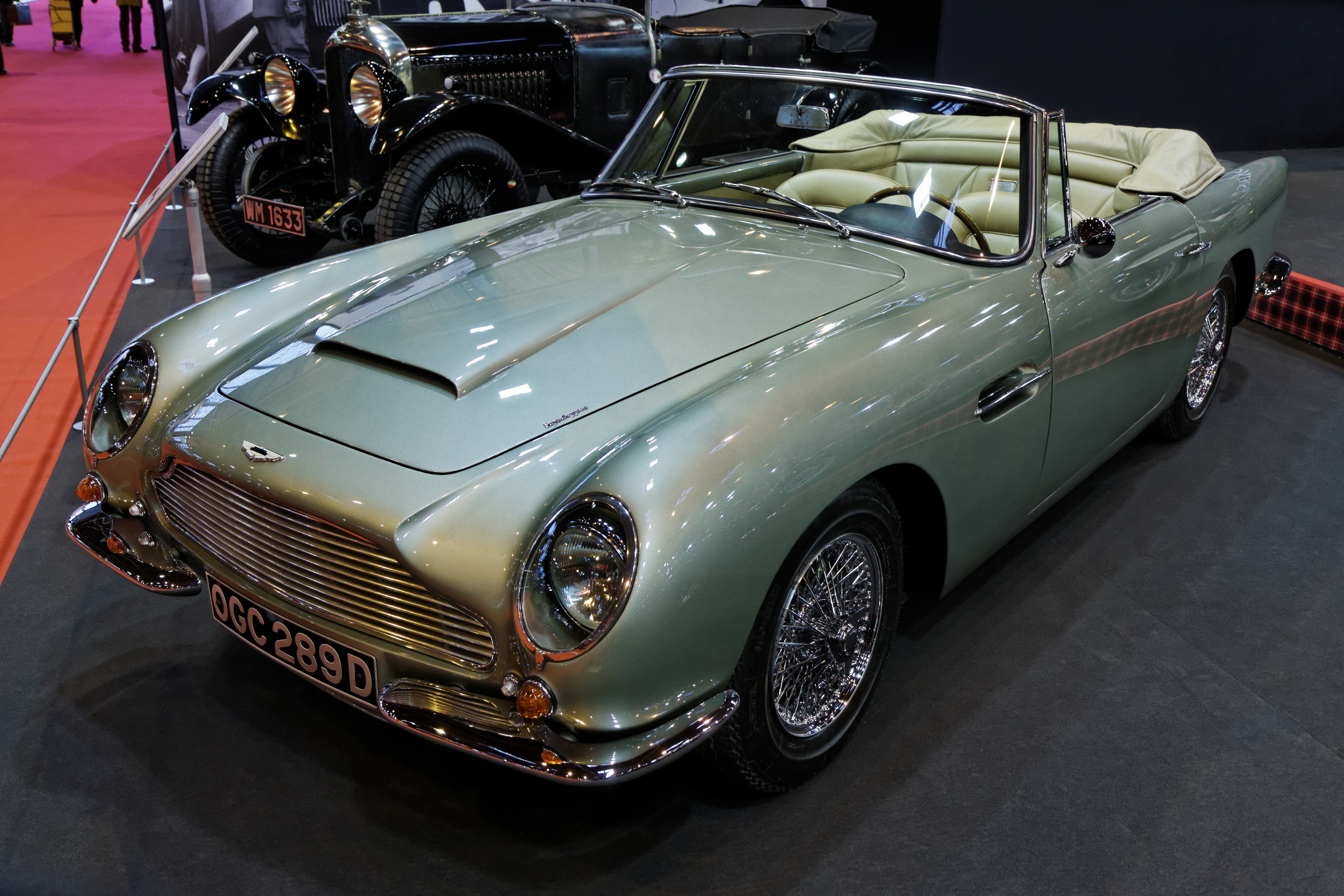 Une Aston Martin DB6 Short Chassis Volante exposée lors du salon Retromobile 2014.